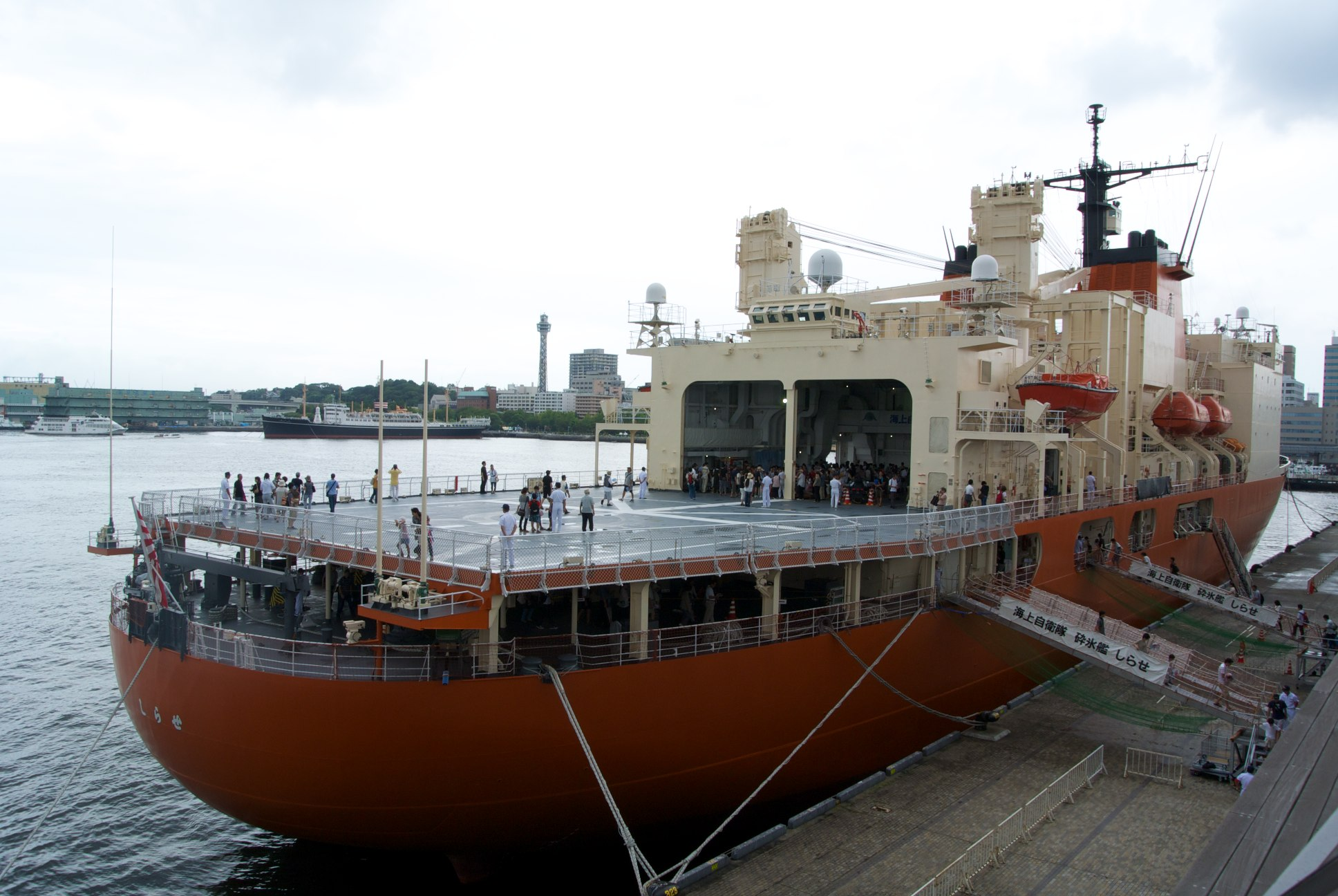 南極観測船しらせ。横浜・大桟橋で一般公開中。